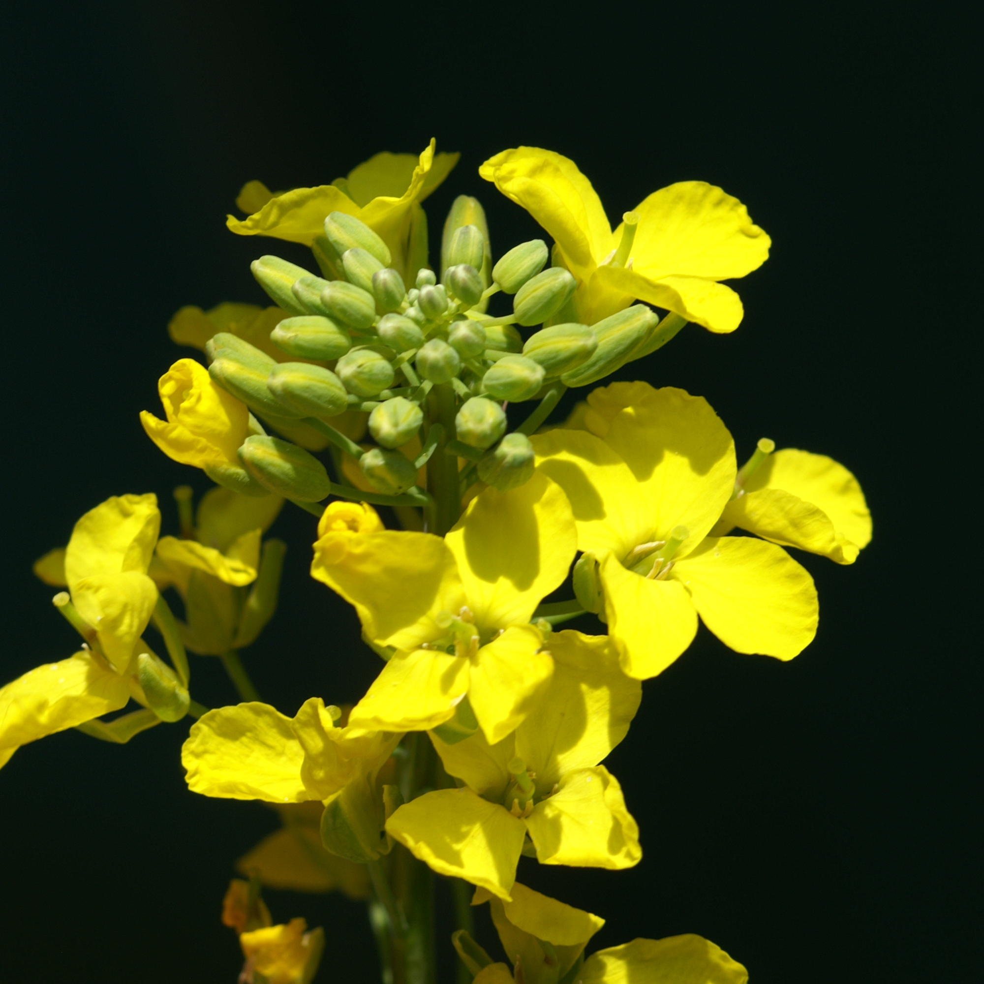 Raps Blütendolde